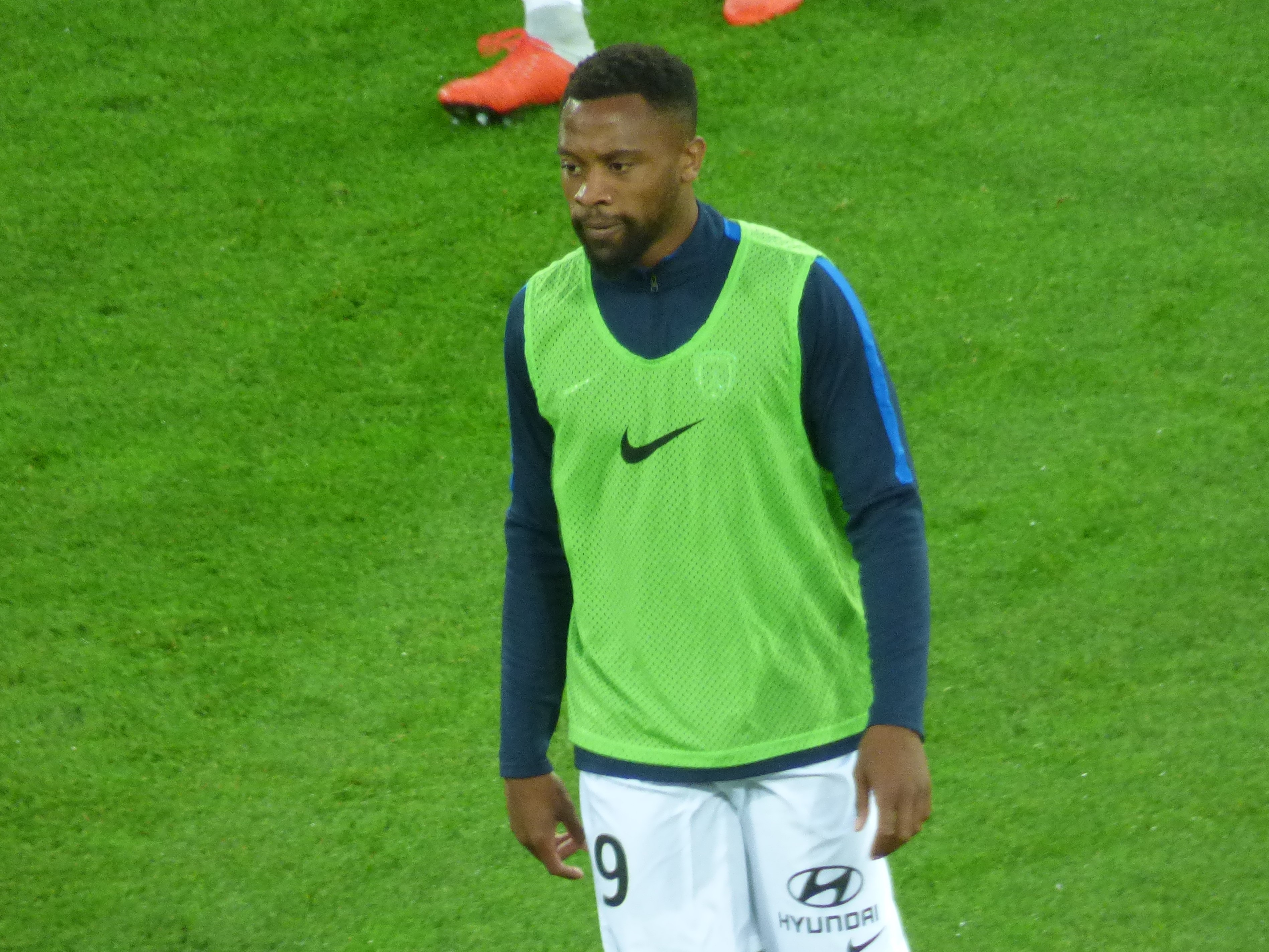 Ousmane Kanté avant le match Lens / Paris, comptant pour la neuvième journée du championnat de France de football de Ligue 2, le 28 septembre 2018.